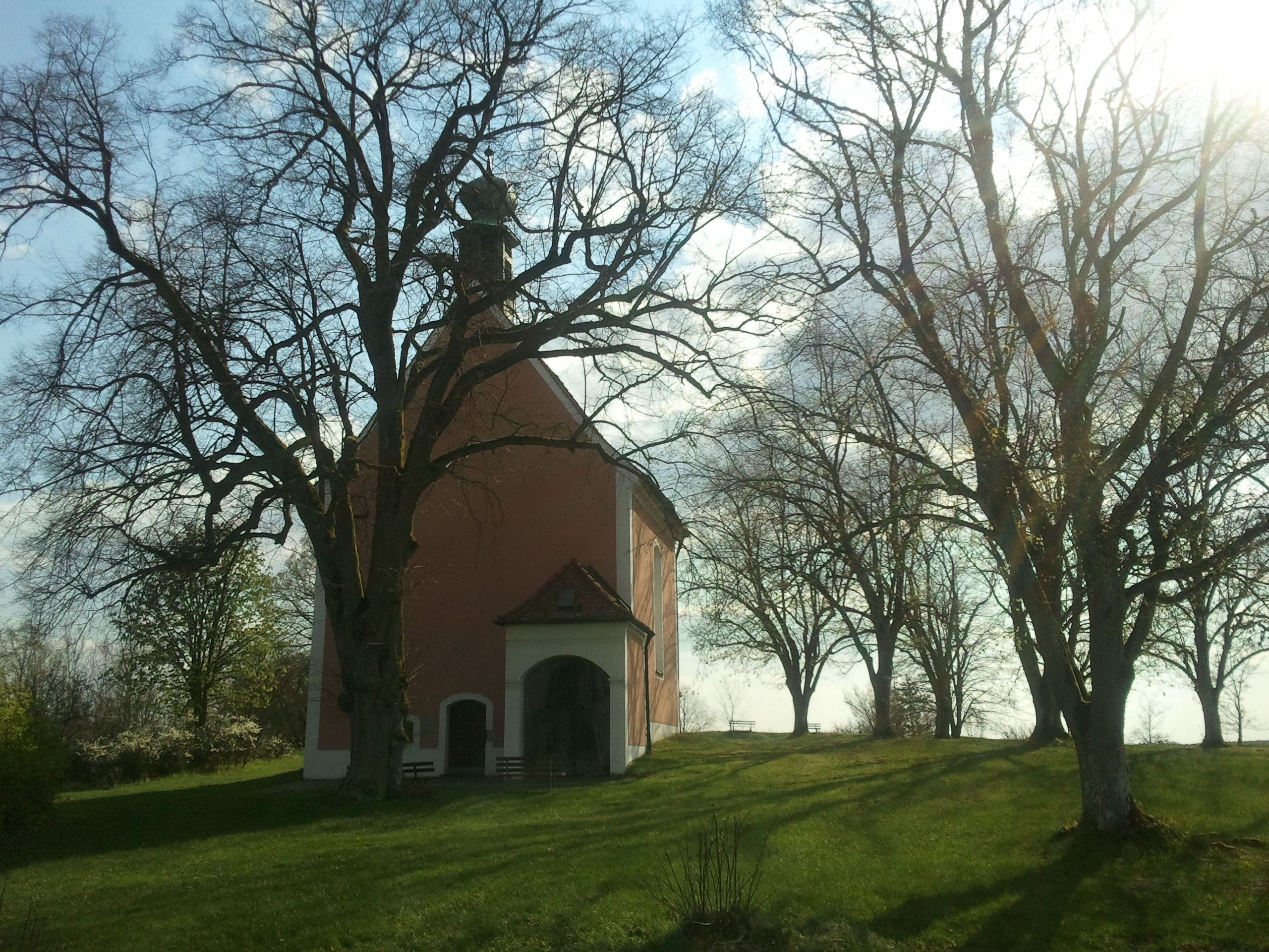 Kreuzbergkirche Schmidmühlen Frühjahr 2011